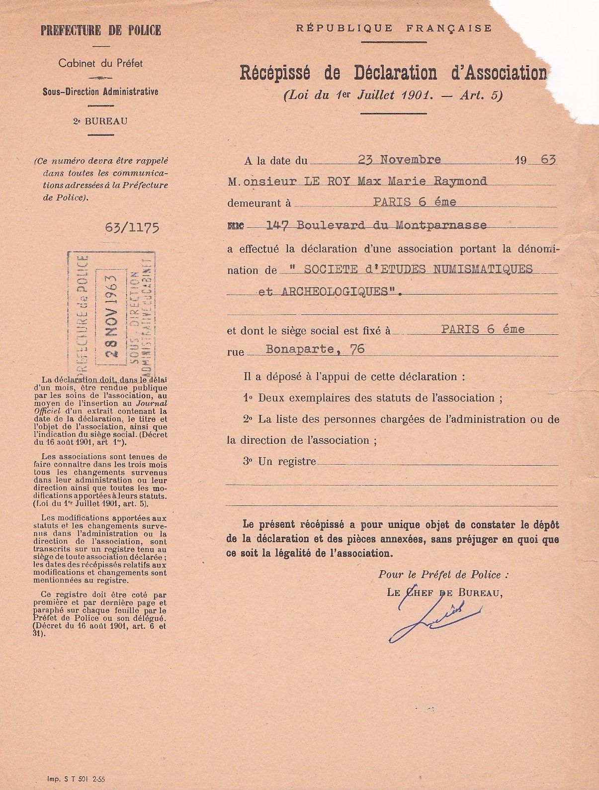 fondation de la SENA